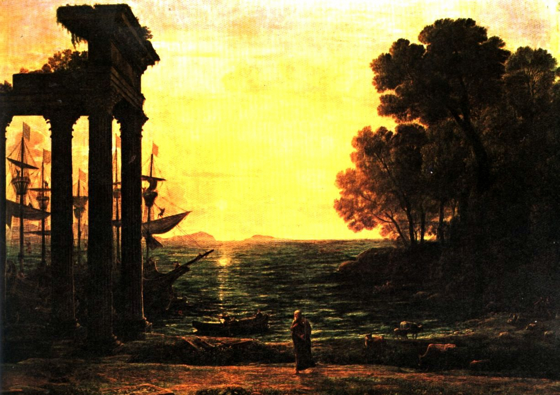 Marina con Ezequiel llorando sobre las ruinas de Tiro (1667), de Claude Lorrain, Col. Duque de Sutherland, Mertoun.